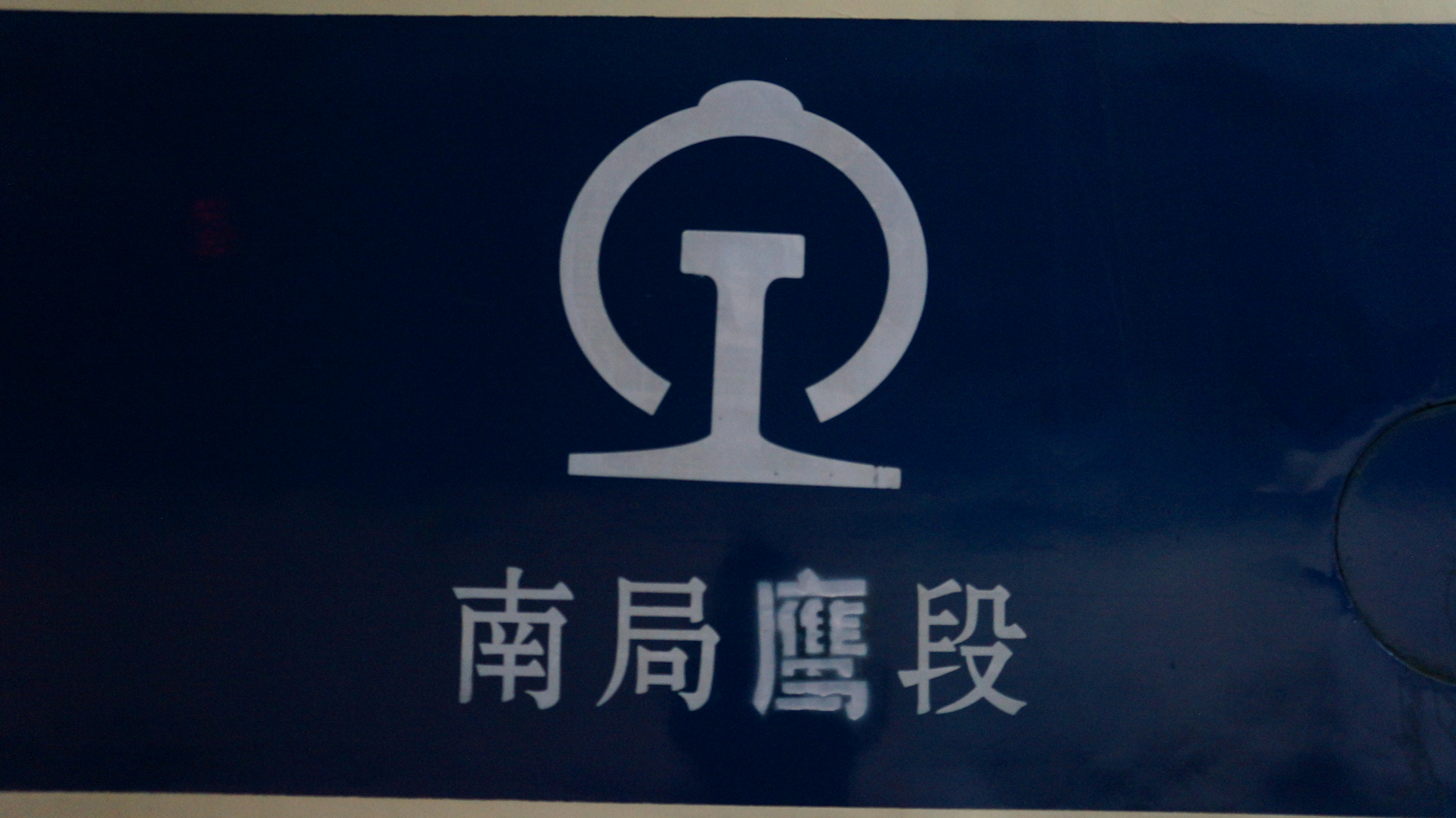 配属鹰潭机务段的DF11